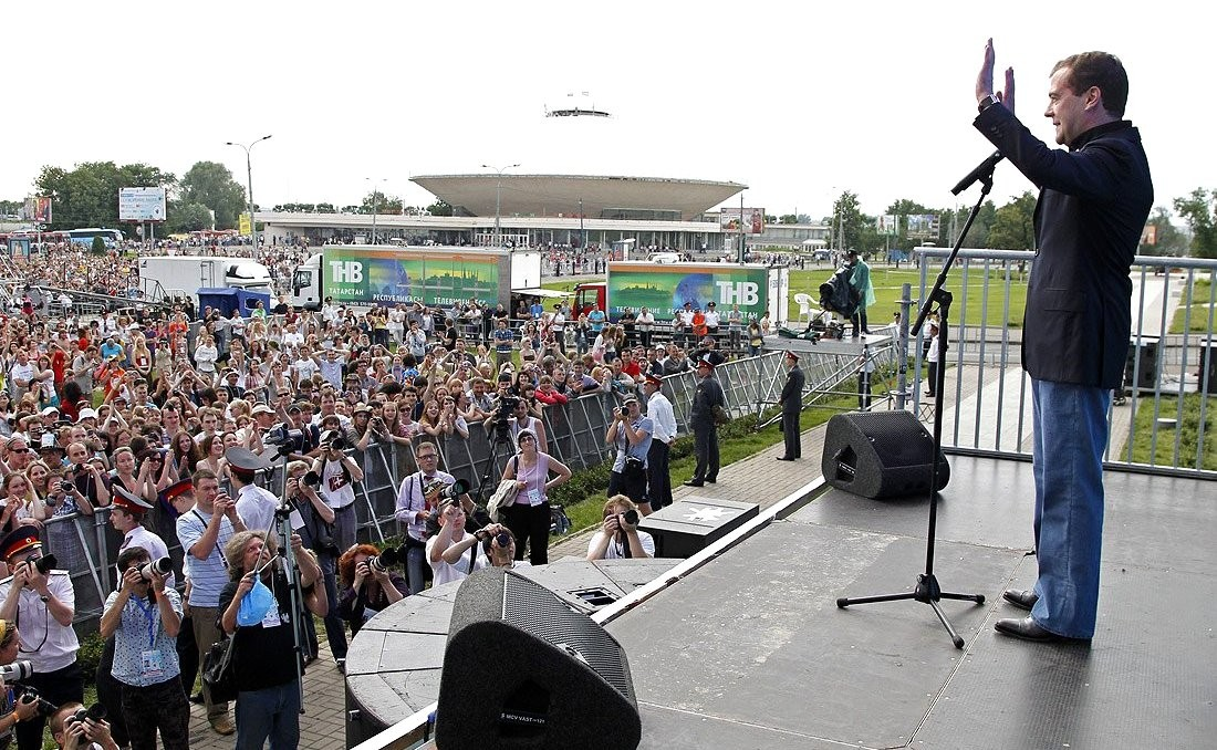 Президент России Д. А. Медведев на фестивале «Сотворение мира»—2011.